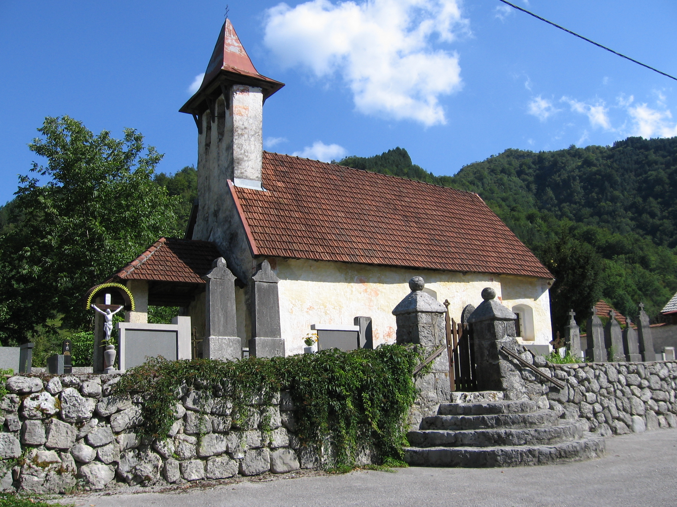 Cerkev Sv. Vida, Bosljiva Loka